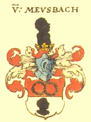 Wappen des Thüringischen Adelsgeschlechts Meusebach